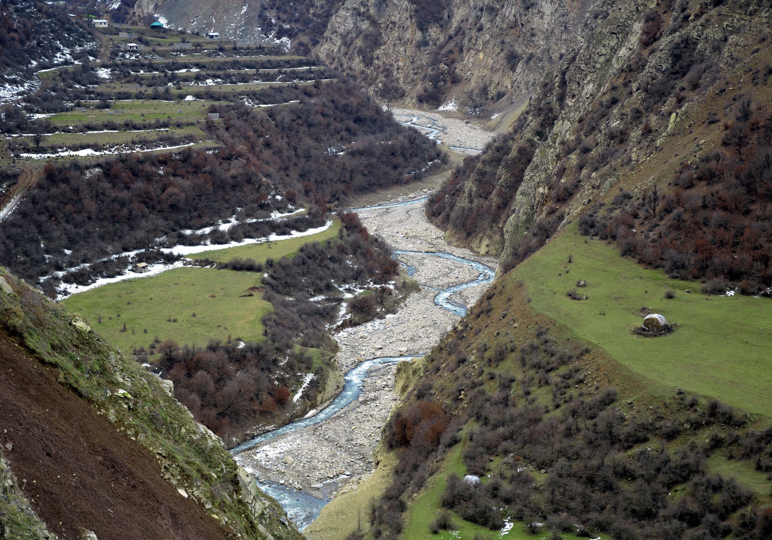 Mazandaran - Tonekabon - 3000 Valley